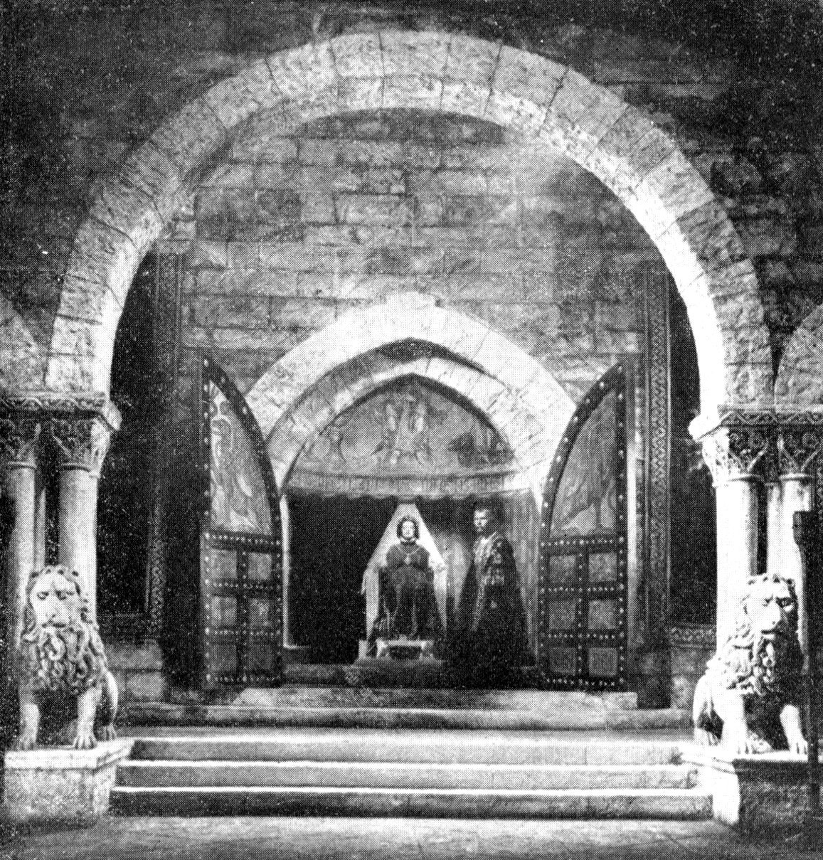 Una scena di "Ettore Fieramosca" (Blasetti, 1938)